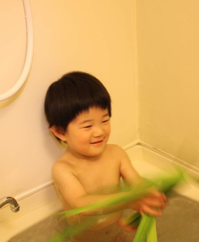 中文（香港）: 日本小孩的菖蒲湯